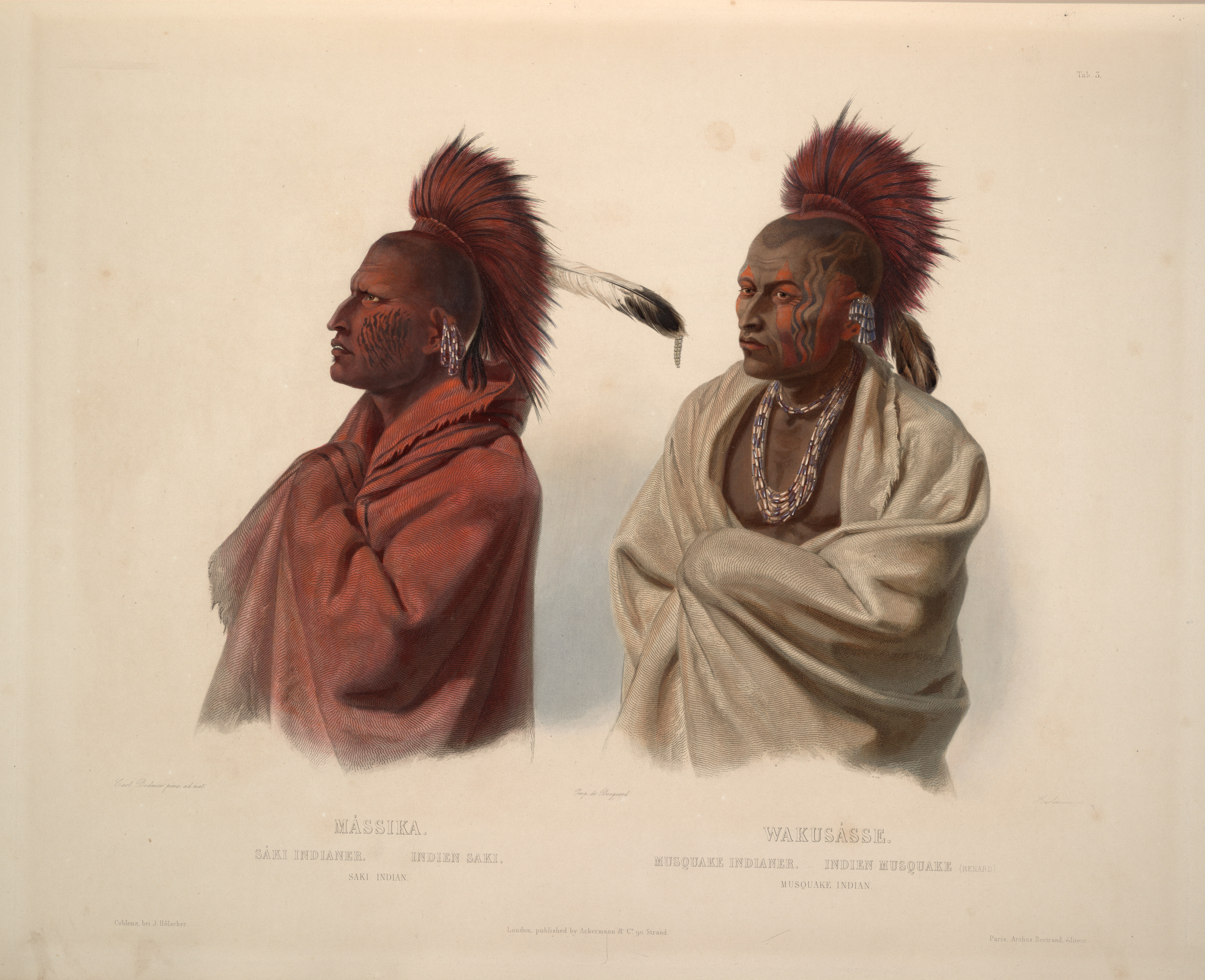 Saki indian and Musquake indian